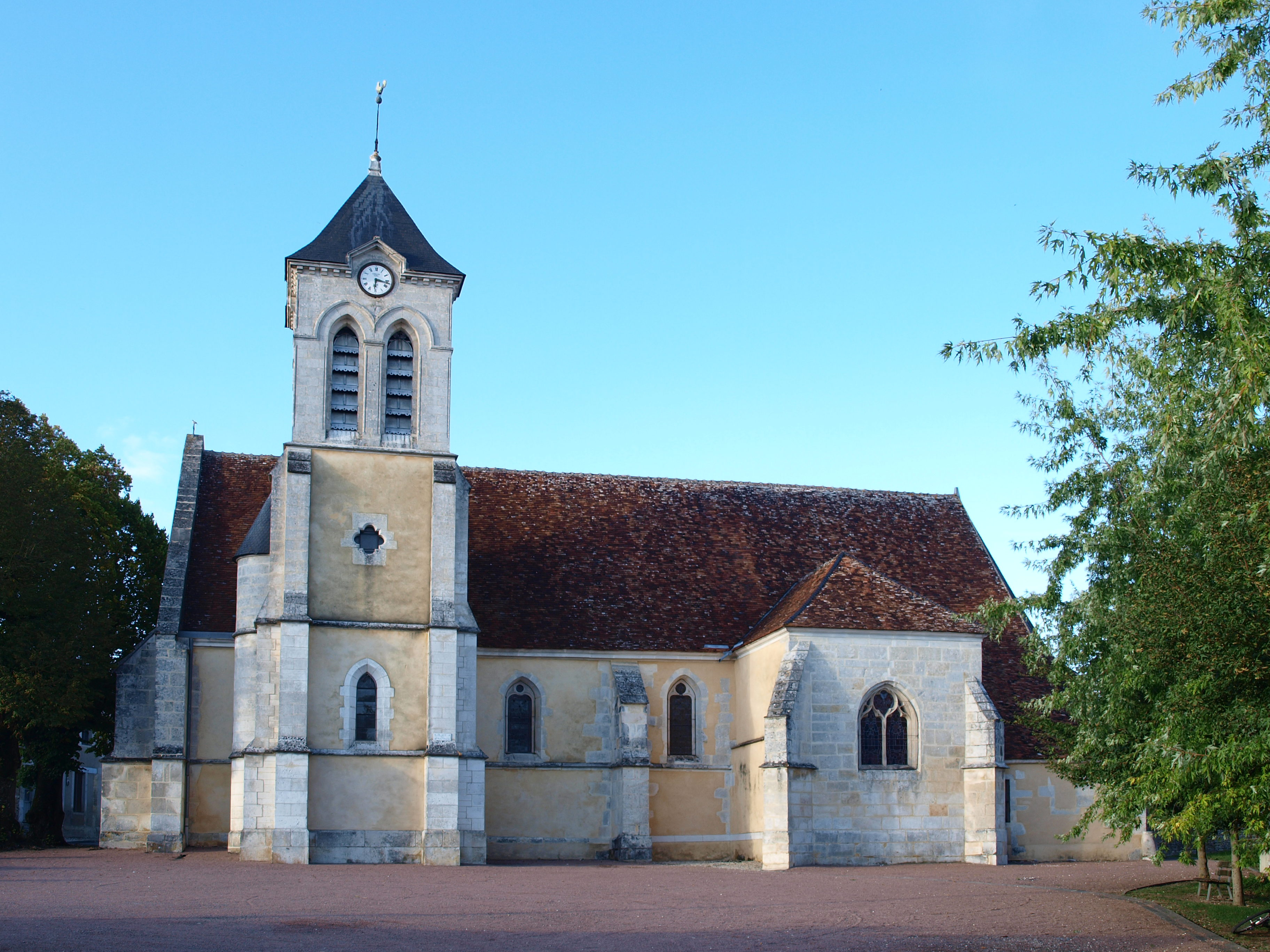 Lain (Yonne, France) ; Église Notre-Dame-de-la-Nativité.